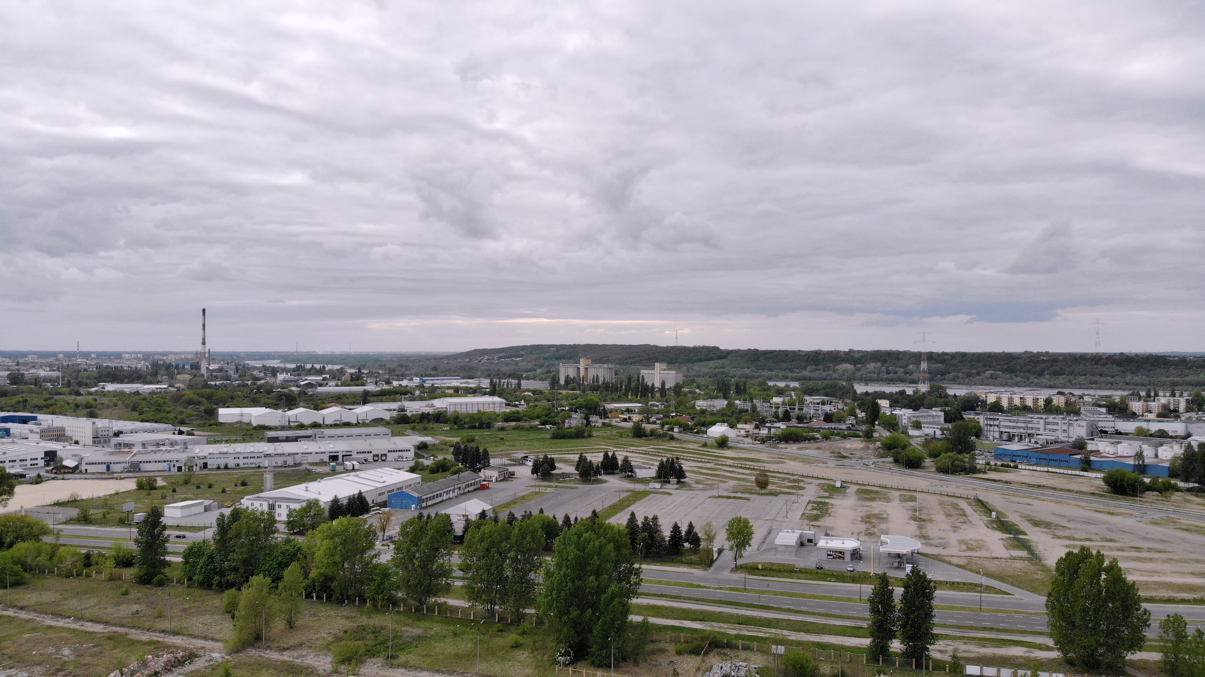 Kazimierza Wielkiego (2020 r.)